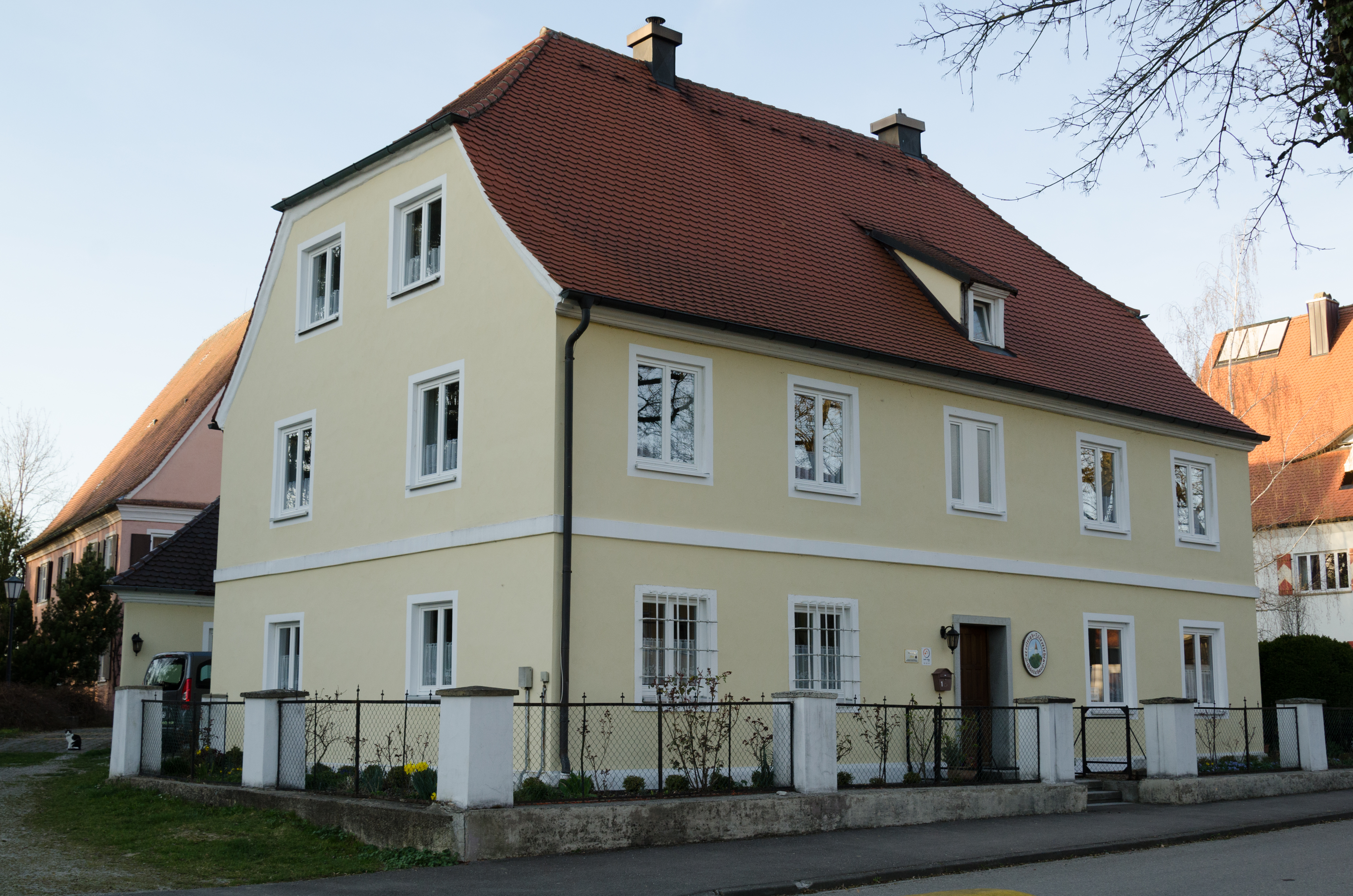 Altenstadt an der Iller, Marktstraße 1